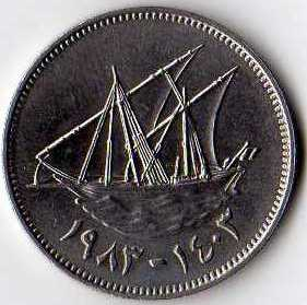 50 kuwejckich filsów - rewers